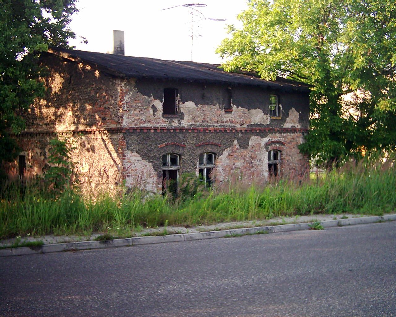 Dom Emila Bartoszka przy ul. Młyńskiej w Czuchowie. 2004